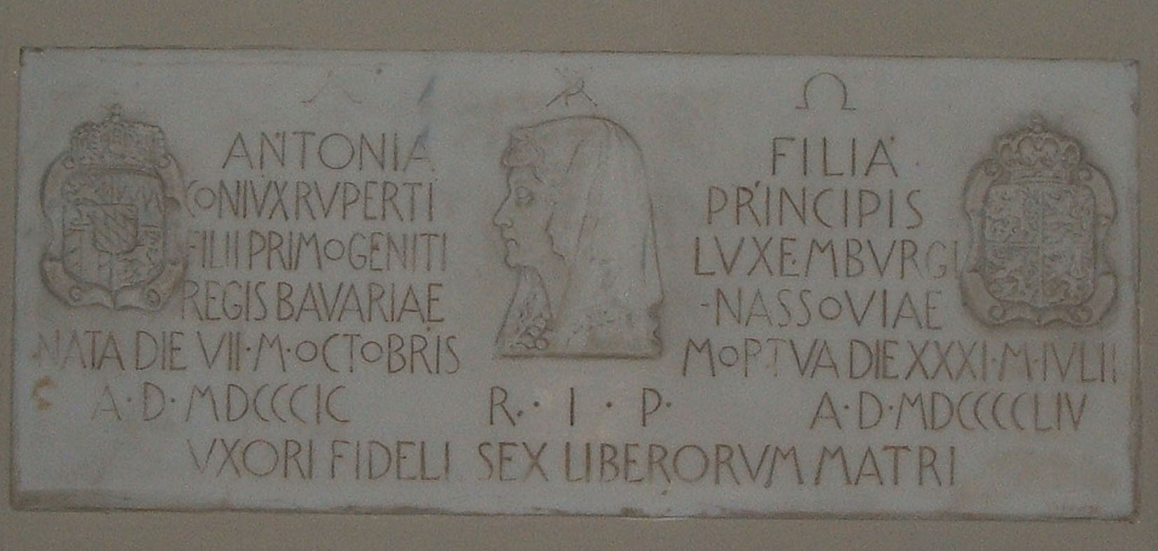 Epitaffio di Antonia di Lussemburgo in S. Maria in Domnica, Roma